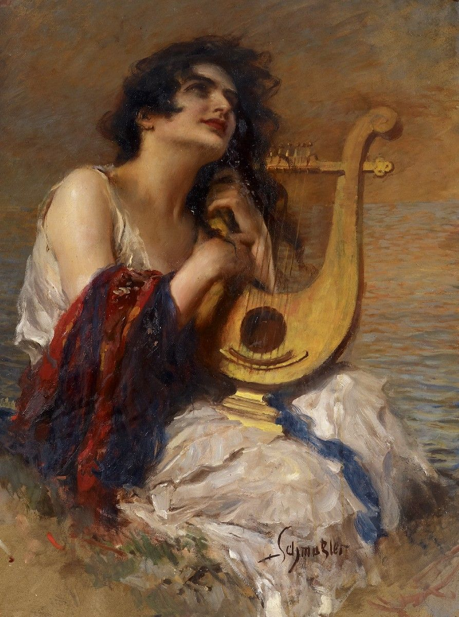 Mädchen mit Lyra